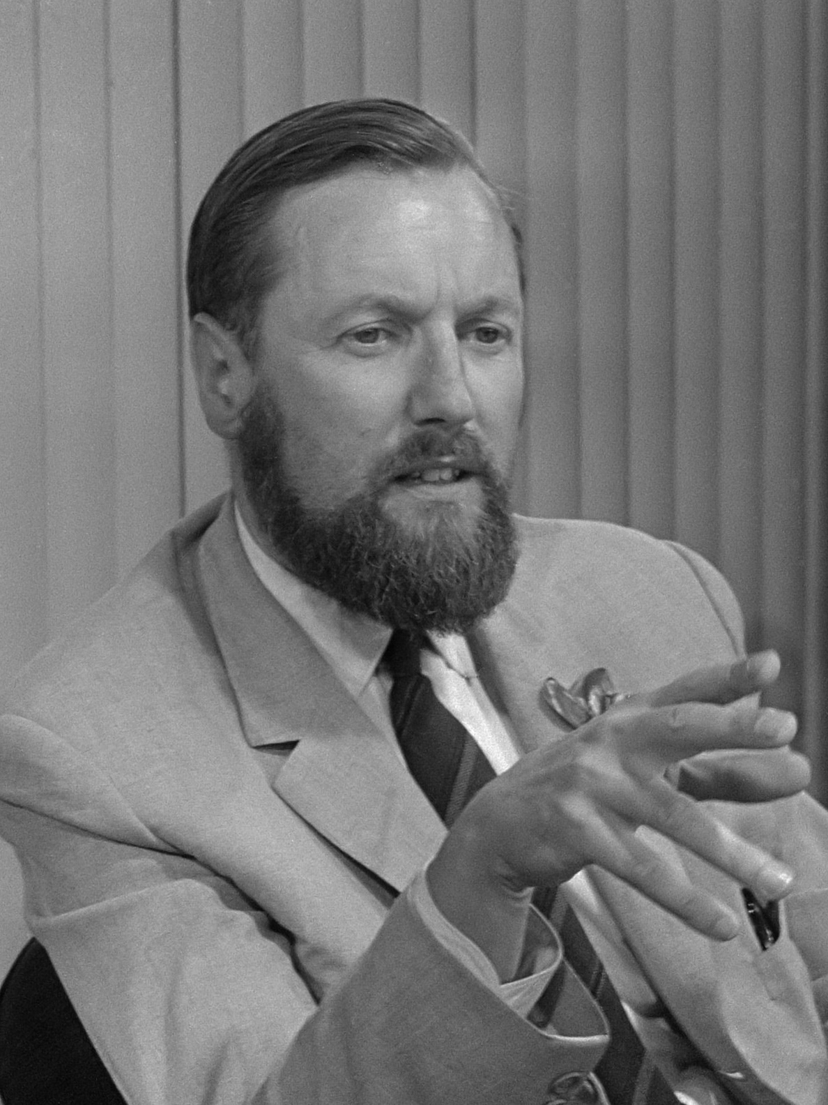 Uitgewezen journalist Frans van Hasselt terug uit Griekenland, Frans van Hasselt tijdens persconferentie 9 mei 1967